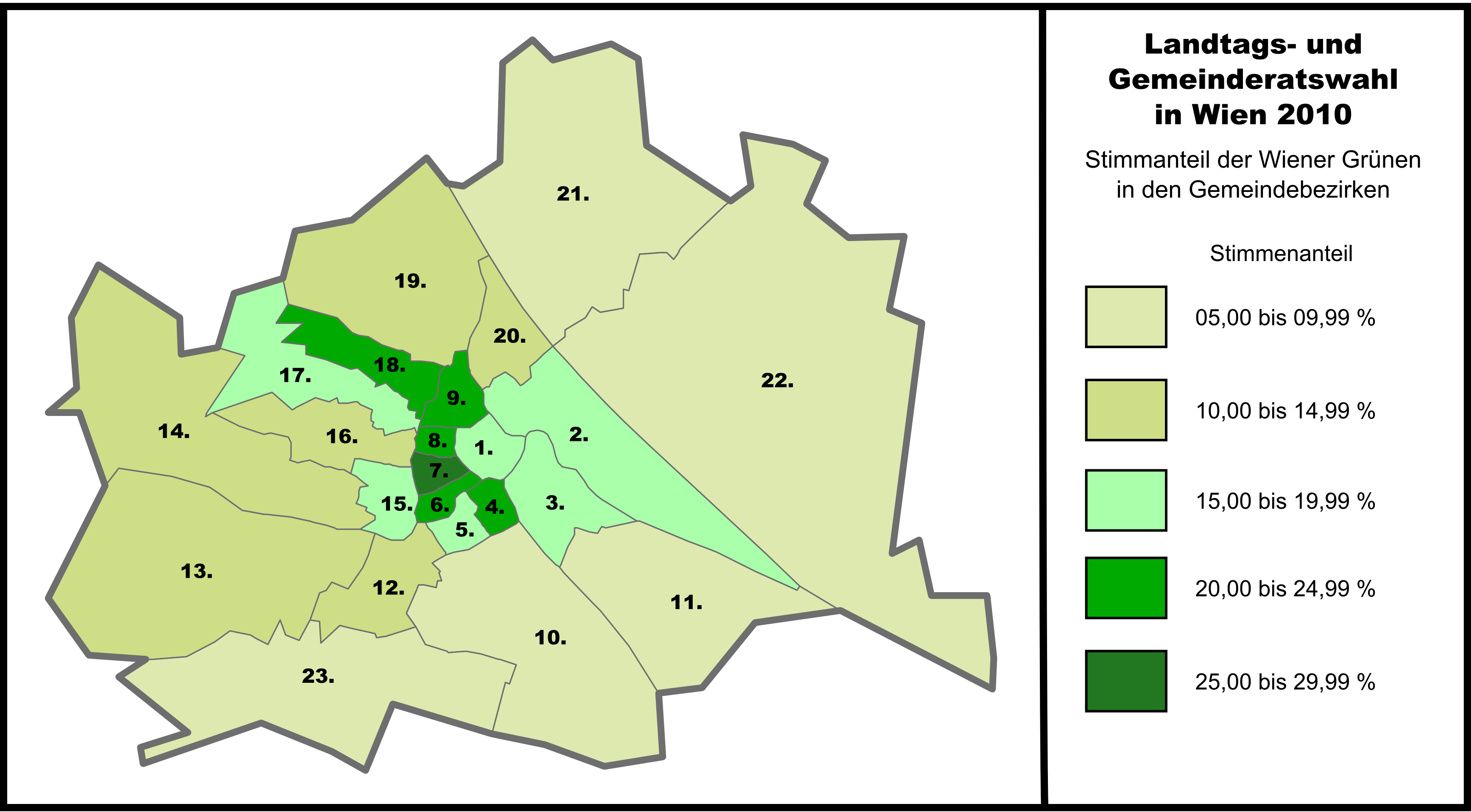 Stimmanteil der Wiener Grünen bei der Landtagswahl 2010